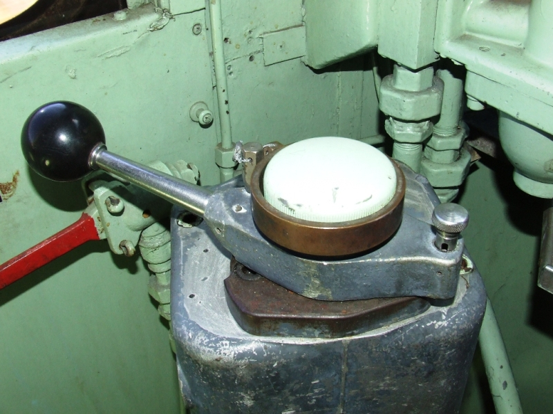 Rubinetto del freno continuo Oerlikon FV4